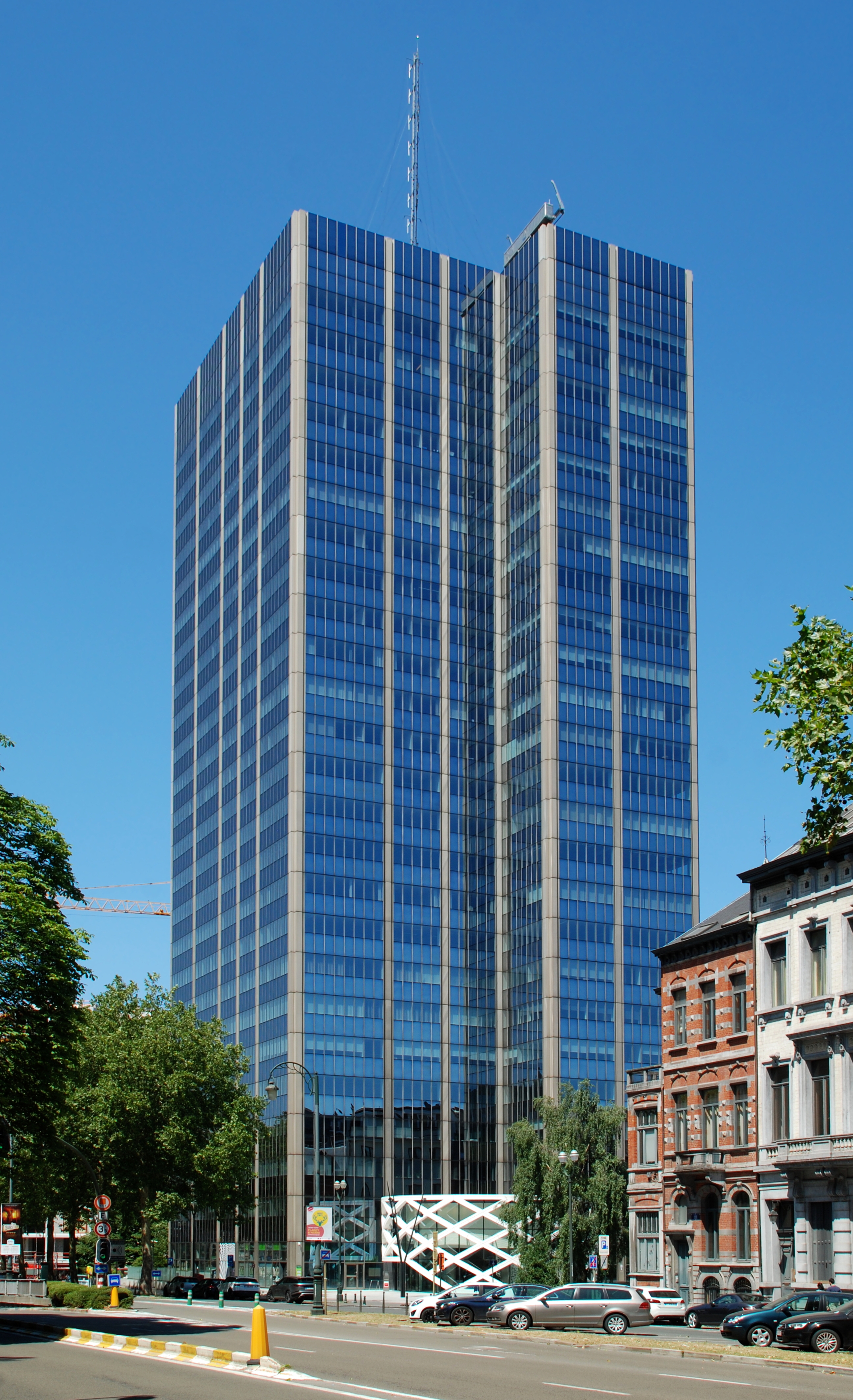 Belgique - Bruxelles - Avenue Louise - Blue Tower (architecte Henri Montois, fonctionnalisme, 1976)